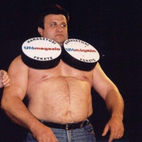 László Fekete.